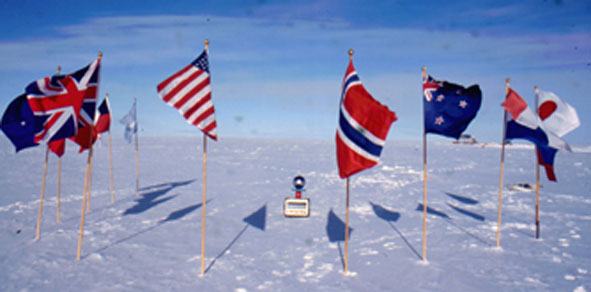 Meteorologisch apparaat